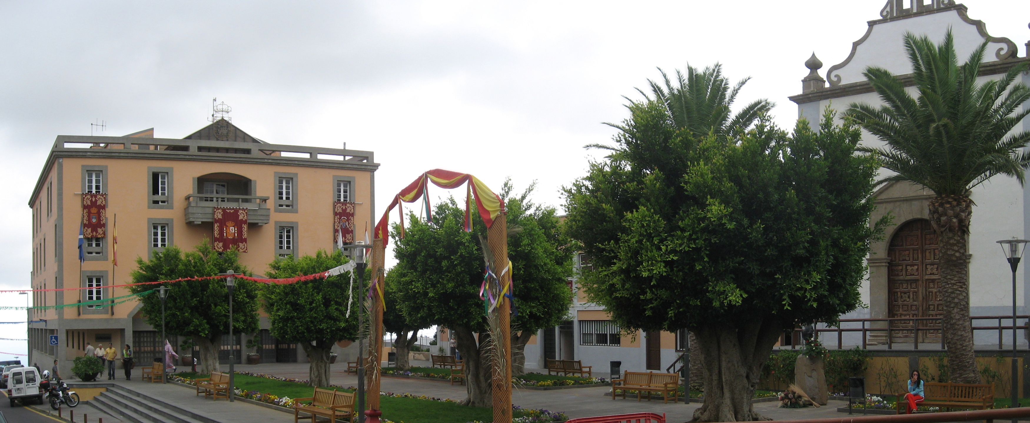 Ayuntamiento de Granadilla de Abona. A la derecha la Iglesia San Fernando Obispo.